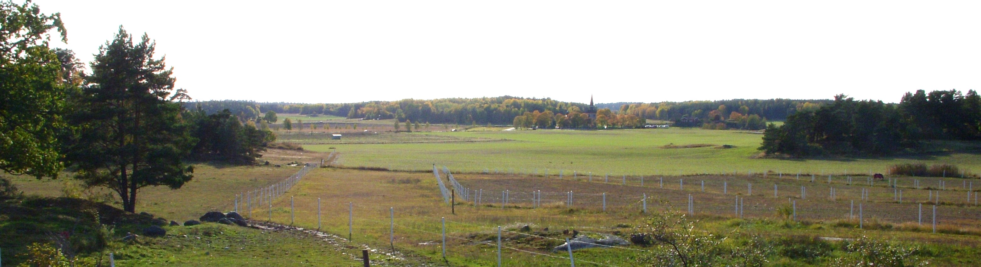 Lovöns kulturlandskap med Lovö kyrka i bakgrunden